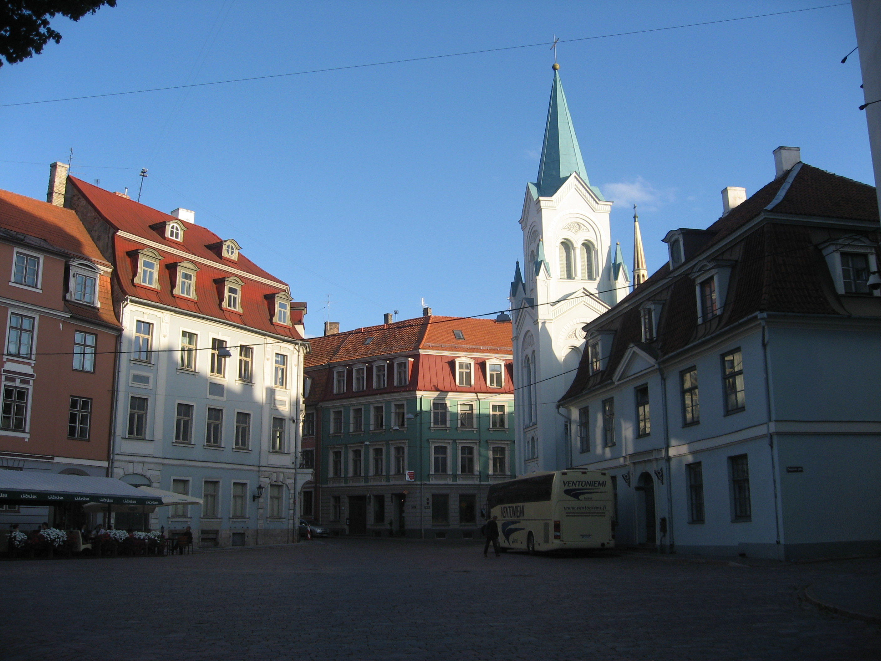 Sāpju Dievmātes Romas katoļu baznīca